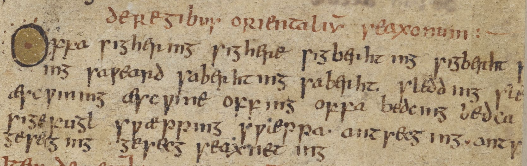 Généalogie du roi Offa d'Essex.